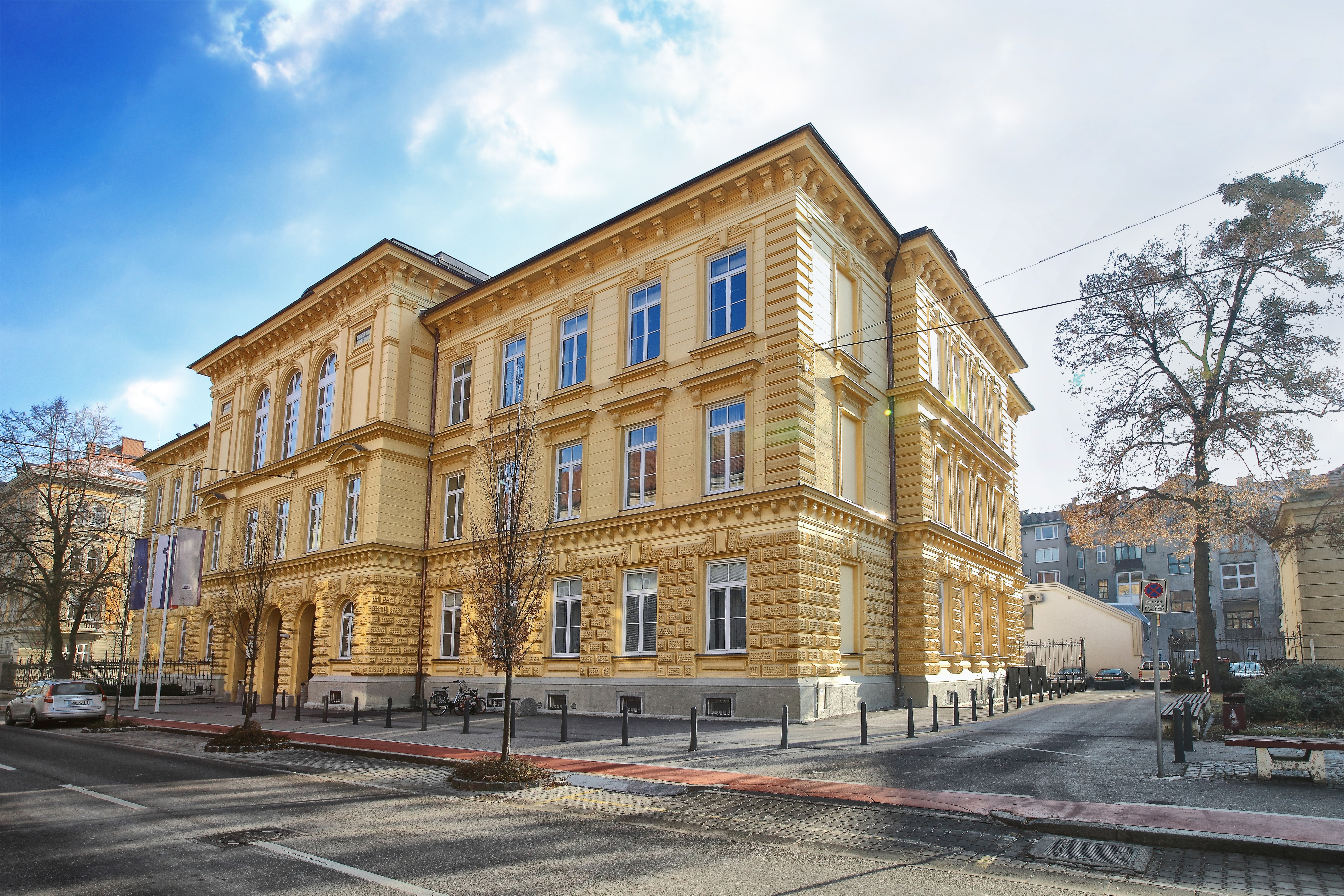 Stavba Pravne fakultete Univerze v Mariboru